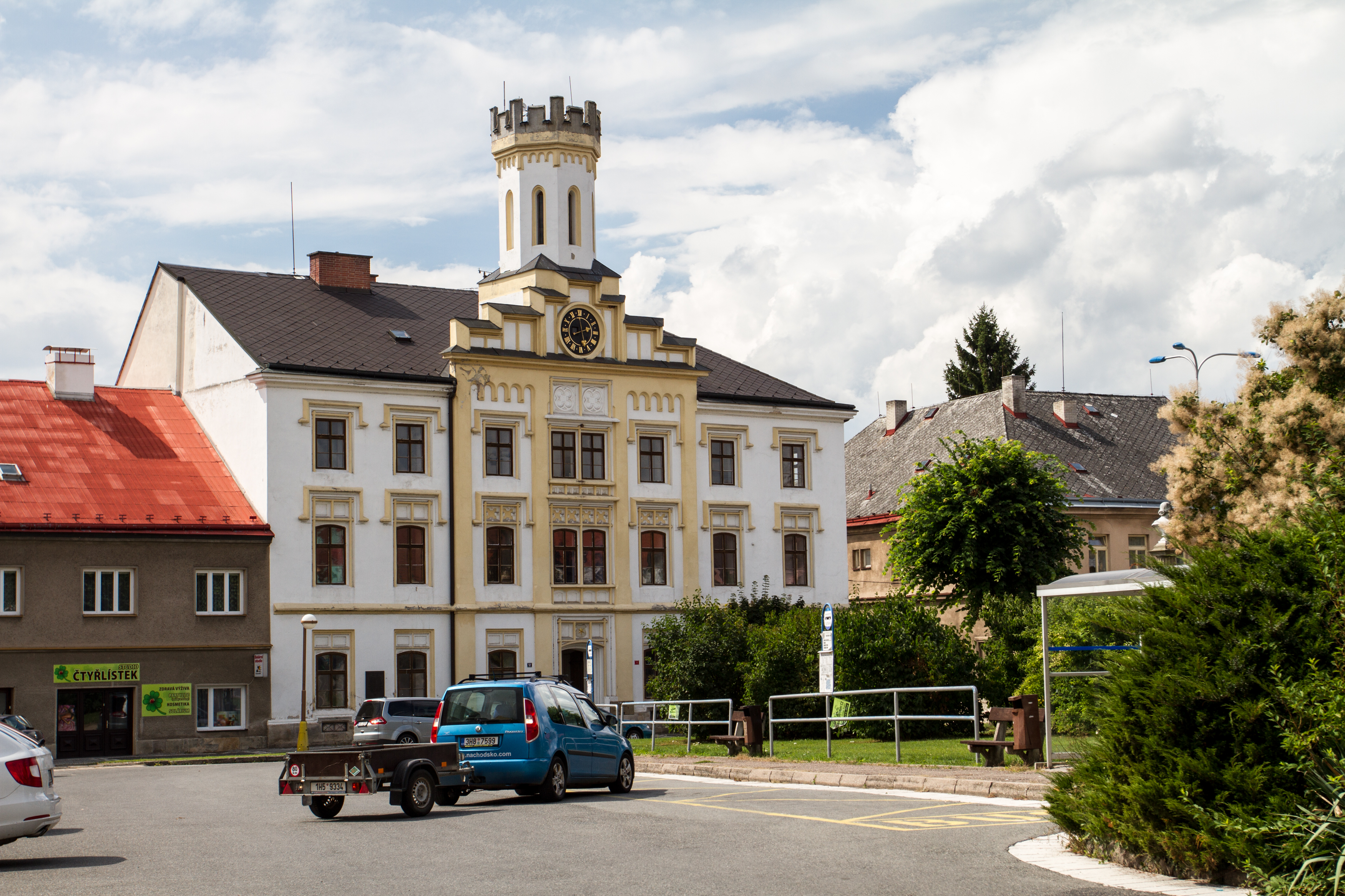 Radnice, Husovo náměstí 1, Česká Skalice.